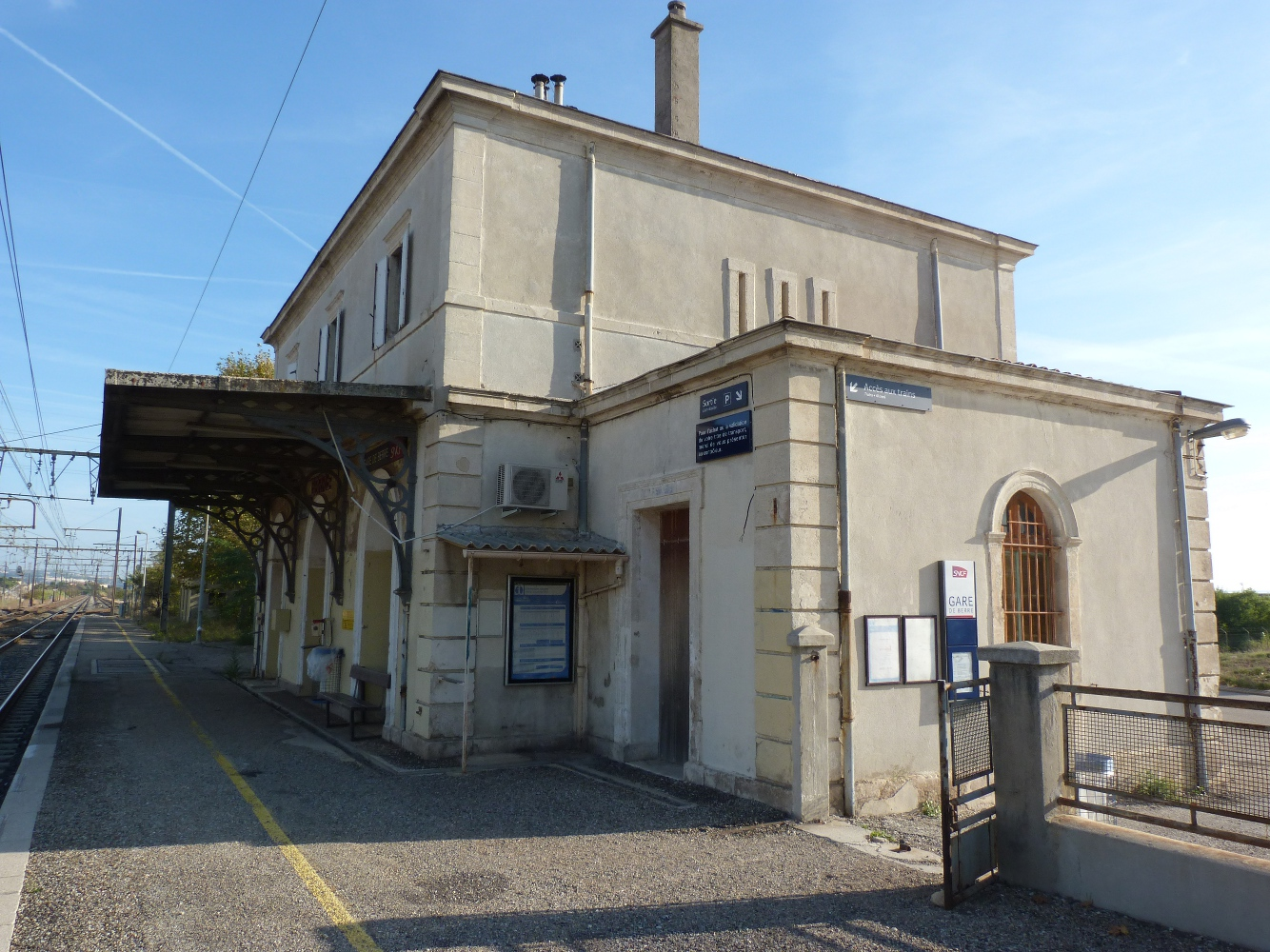 Bâtiment principal de la Gare de Berre-l'Étang.